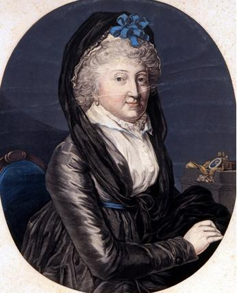 Graphisches Porträt der Gräfin Sophie Marie von Voss, geb. von Pannewitz (1729-1814); Farbholzschnitt von acht Platten